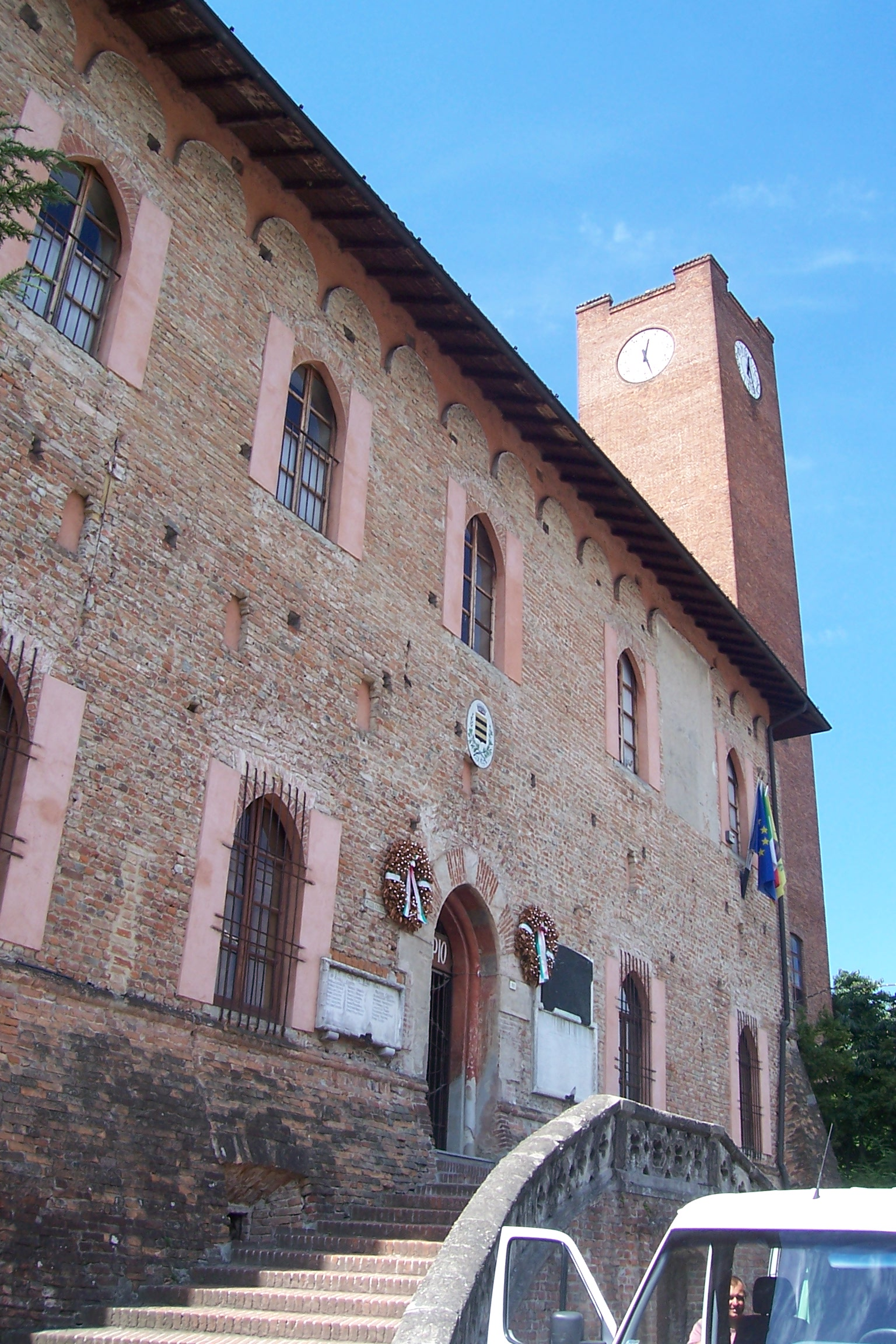 Villanterio, la sede del comune